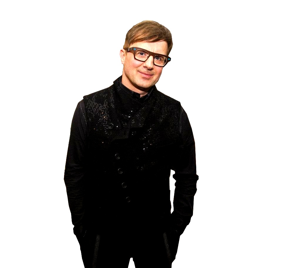 Petr Kotvald 2013